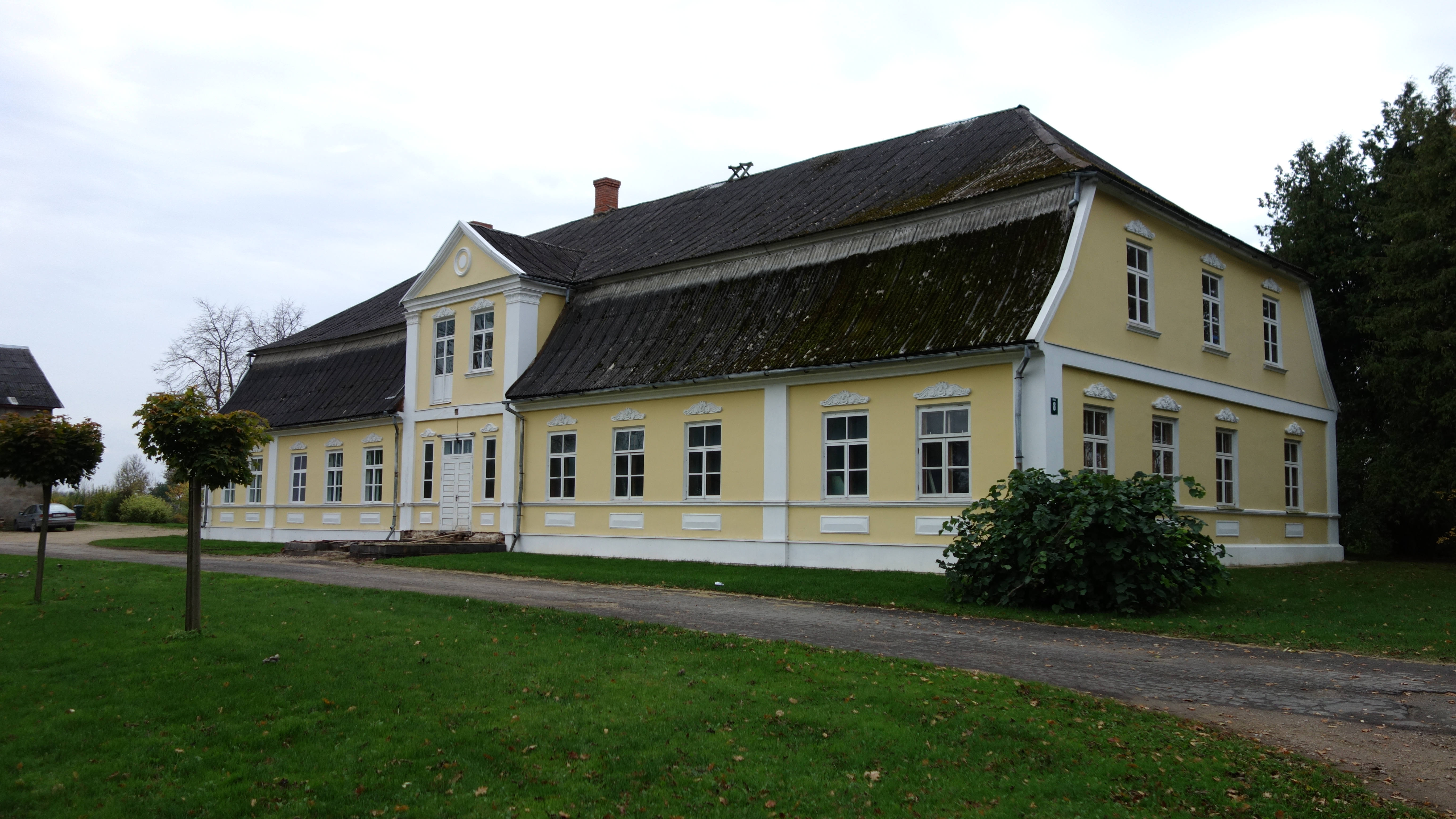 Code mõisa peahoone